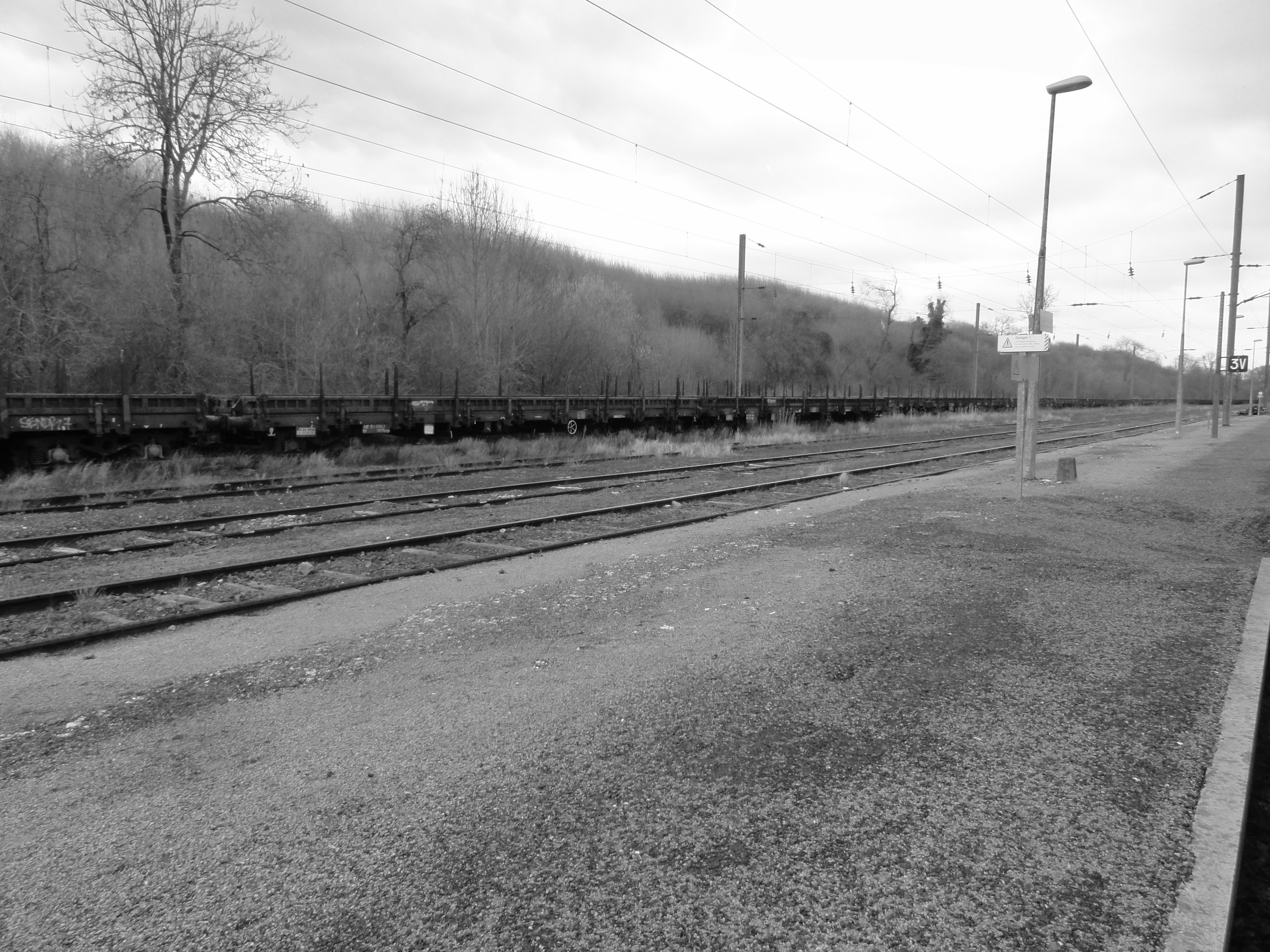 Gare de Prouvy - Thiant de Prouvy, Nord, Nord-Pas-de-Calais, France.